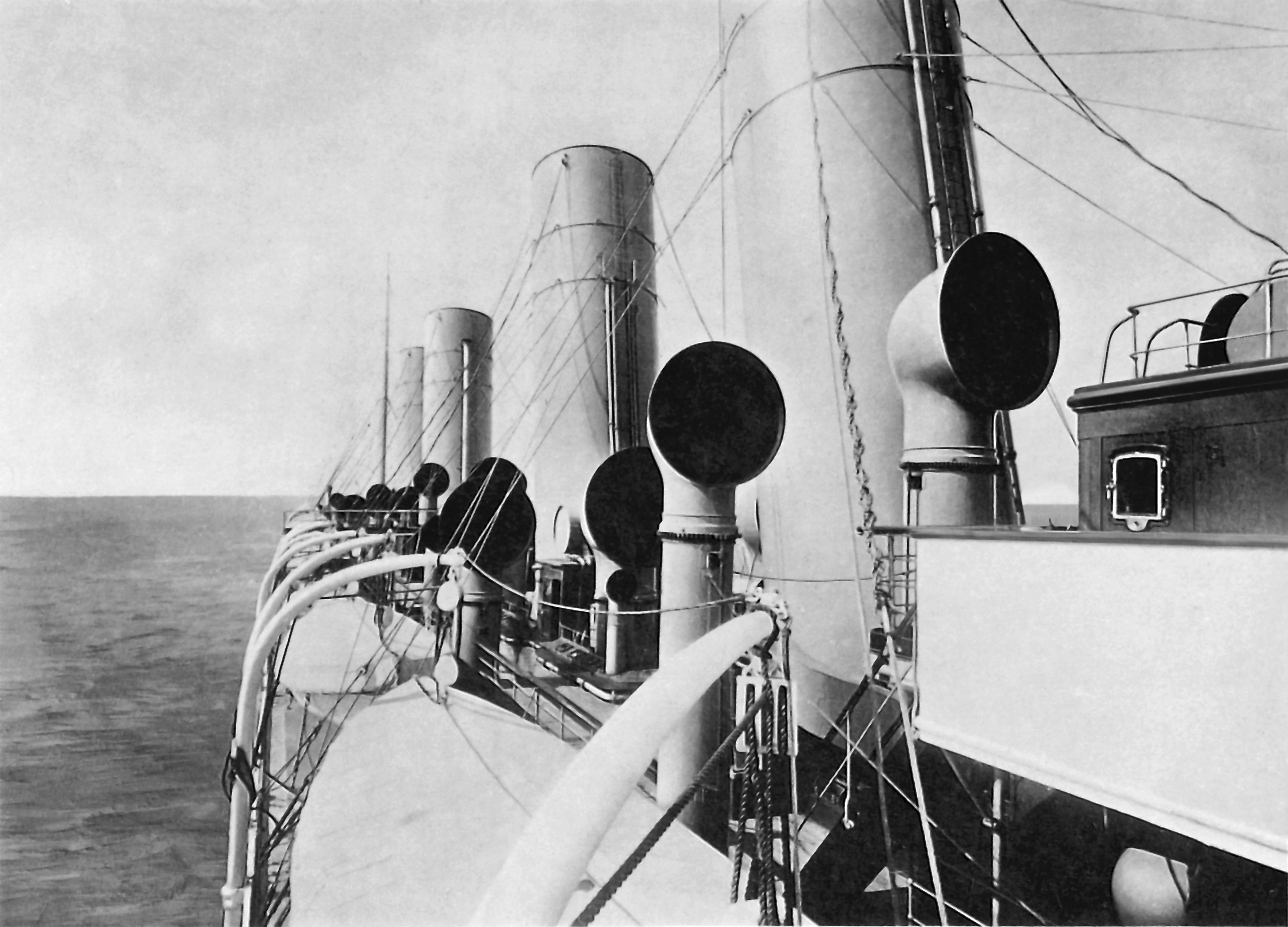 Der 1901 in Dienst gestellte Vierschonsteiner Kronprinz Wilhelm. Blick von den Rettungsbooten über das Sonnendeck. Zu sehen ist ganz rechts der rückwärtig Teil der Brücke. Darunter befand sich die umfangreiche Kapitänskajüte. Zum typischen Bild der großen Atlantikliner gehörten auch die zahlreichen Ventilatoren.